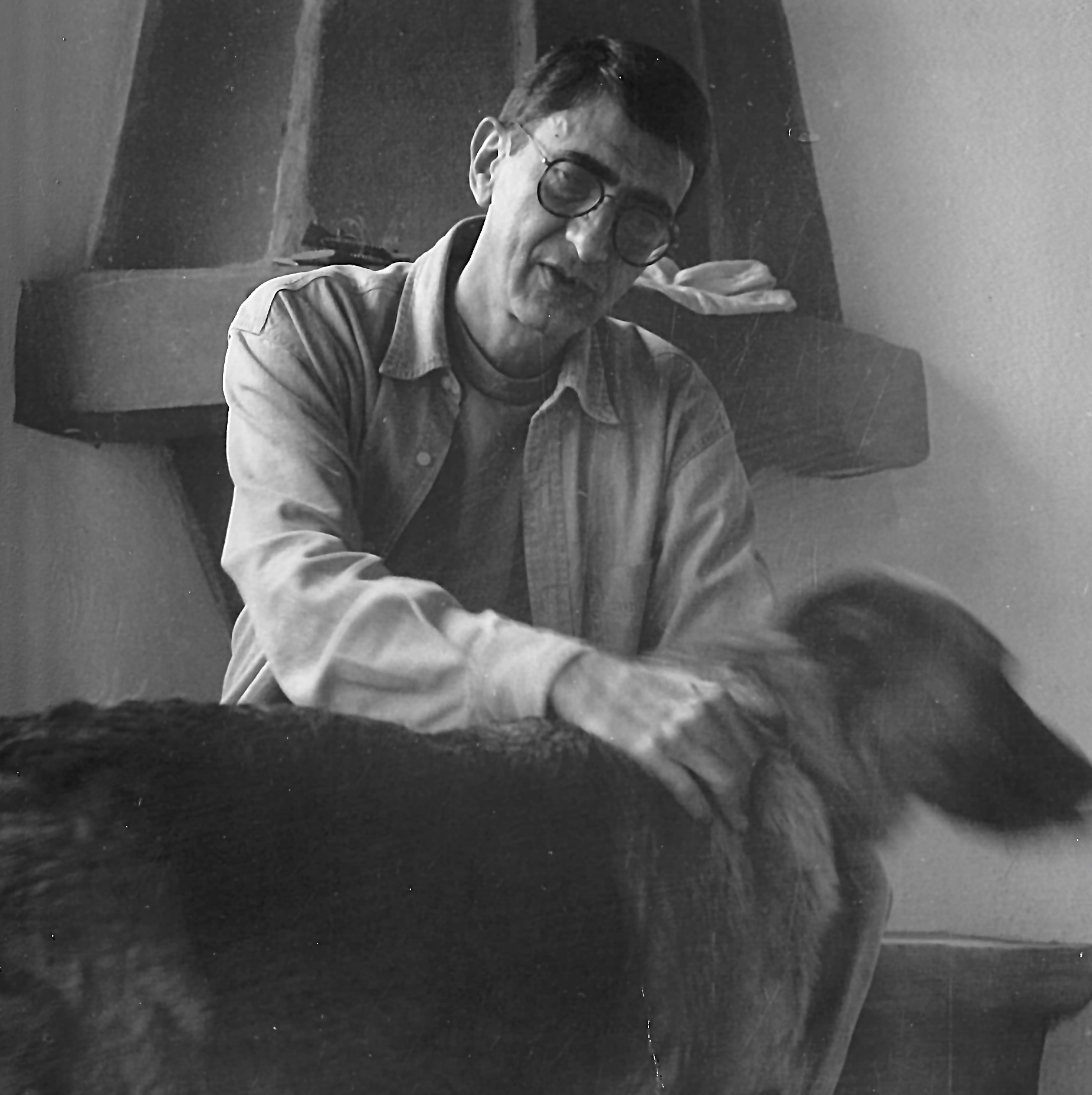 JUAN TOVAR con Loba 1999